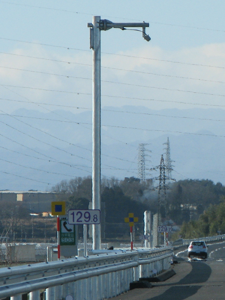 VICS 電波ビーコン北関東自動車道 真岡IC～桜川筑西ICにて撮影